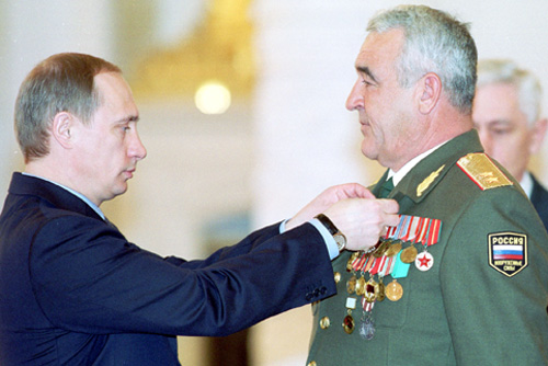 МОСКВА, БОЛЬШОЙ КРЕМЛЕВСКИЙ ДВОРЕЦ. Церемония вручения государственных наград. Звание Героя России присвоено генерал-лейтенанту Владимиру Булгакову.